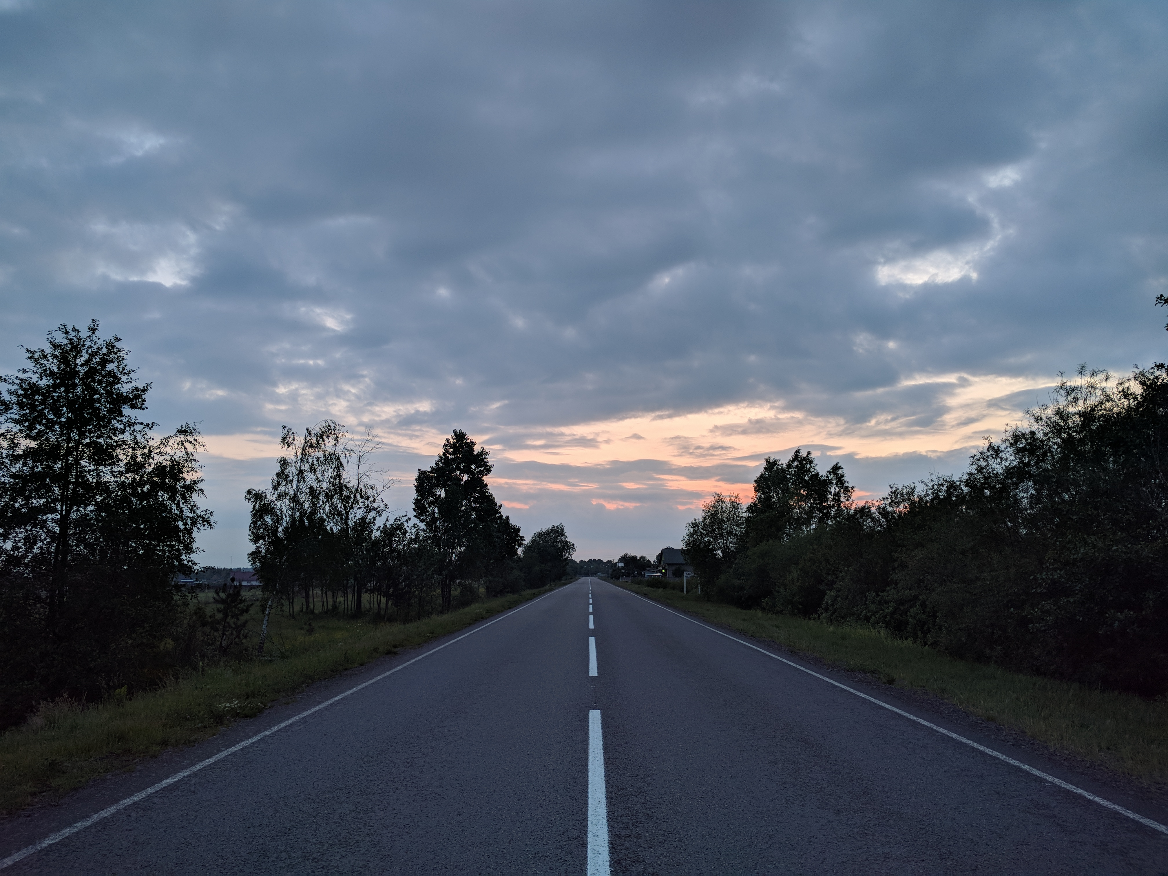 Автошлях Т-14-10 поблизу села Корчин, вечірнє фото